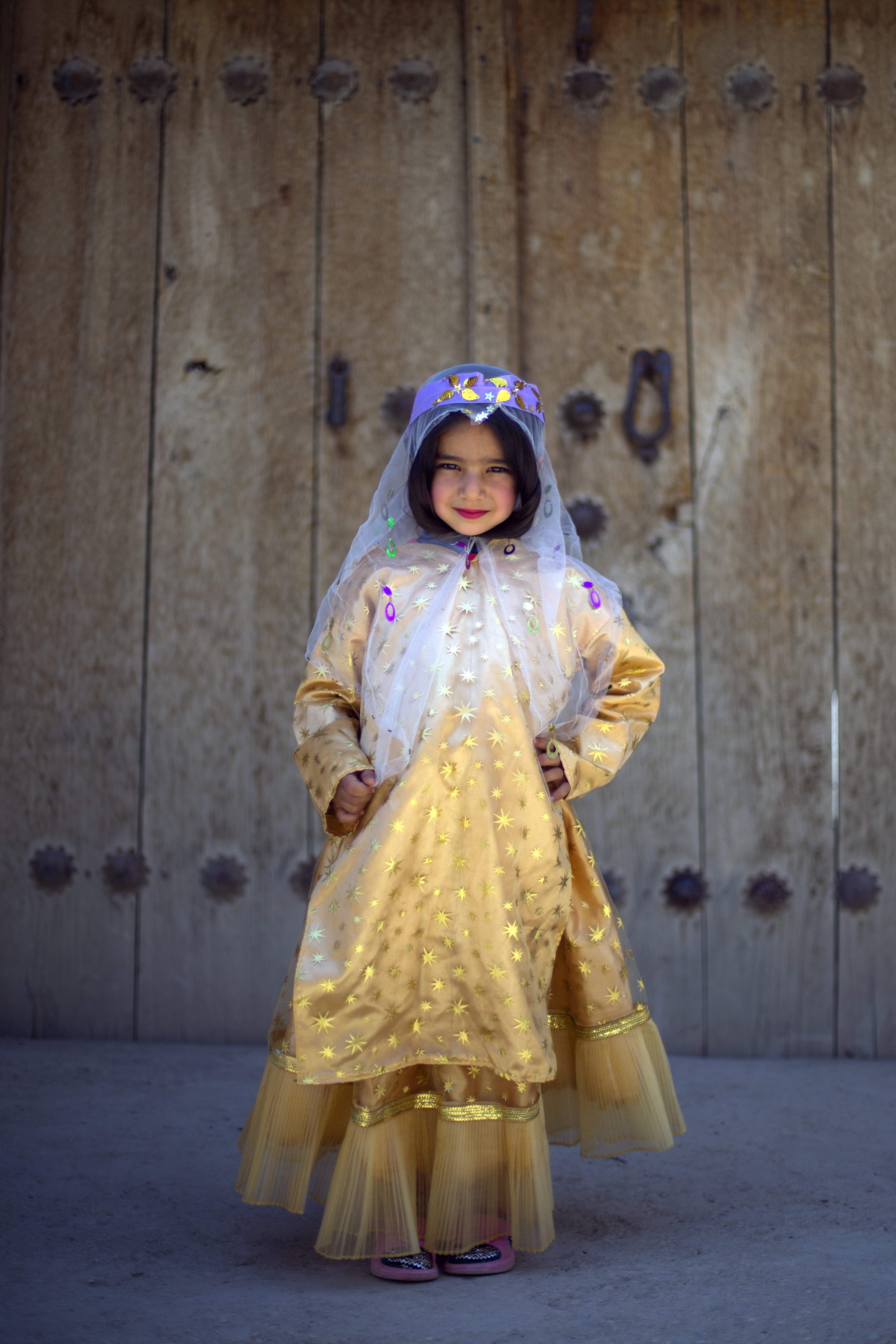 روستای خفر جنوبی‌ترین روستای پادنای وسطی است که در ۸۴ کیلومتری شهر سمیرم در استان اصفهان قرار گرفته است. این روستا در دامنه بلندترین قله دنا (قاش مستان) بر روی اراضی پر شیب ساخته شده و یکی از بهترین مسیرهای کوهنوردی قله‌های دنا می باشد. روستای خفر دارای جمعیتی حدود ۱۶۰۰ نفر در زمستان و ۳۰۰۰ نفر در تابستان است. به دلیل واقع شدن این روستا در دامنه رشته کوه دنا و آب و هوای کوهستانی منطقه، انواع گونه‌های گیاهی و جانوری در آن دیده می‌شود. وجود ۱۴ قله بالای ۴۰۰۰ متر (قاشمستان بلندترین قله رشته کوه دنا با ارتفاع ۴۴۳۵ متر در نزدیکی این روستا قرار دارد.)، همچنین انواع یخچال‌های طبیعی، آبشارهای متعدد و رودخانه‌های جاری شده از یخچال‌ها، چشم اندازهایی زیبا در این ناحیه بوجود آورده‌است.